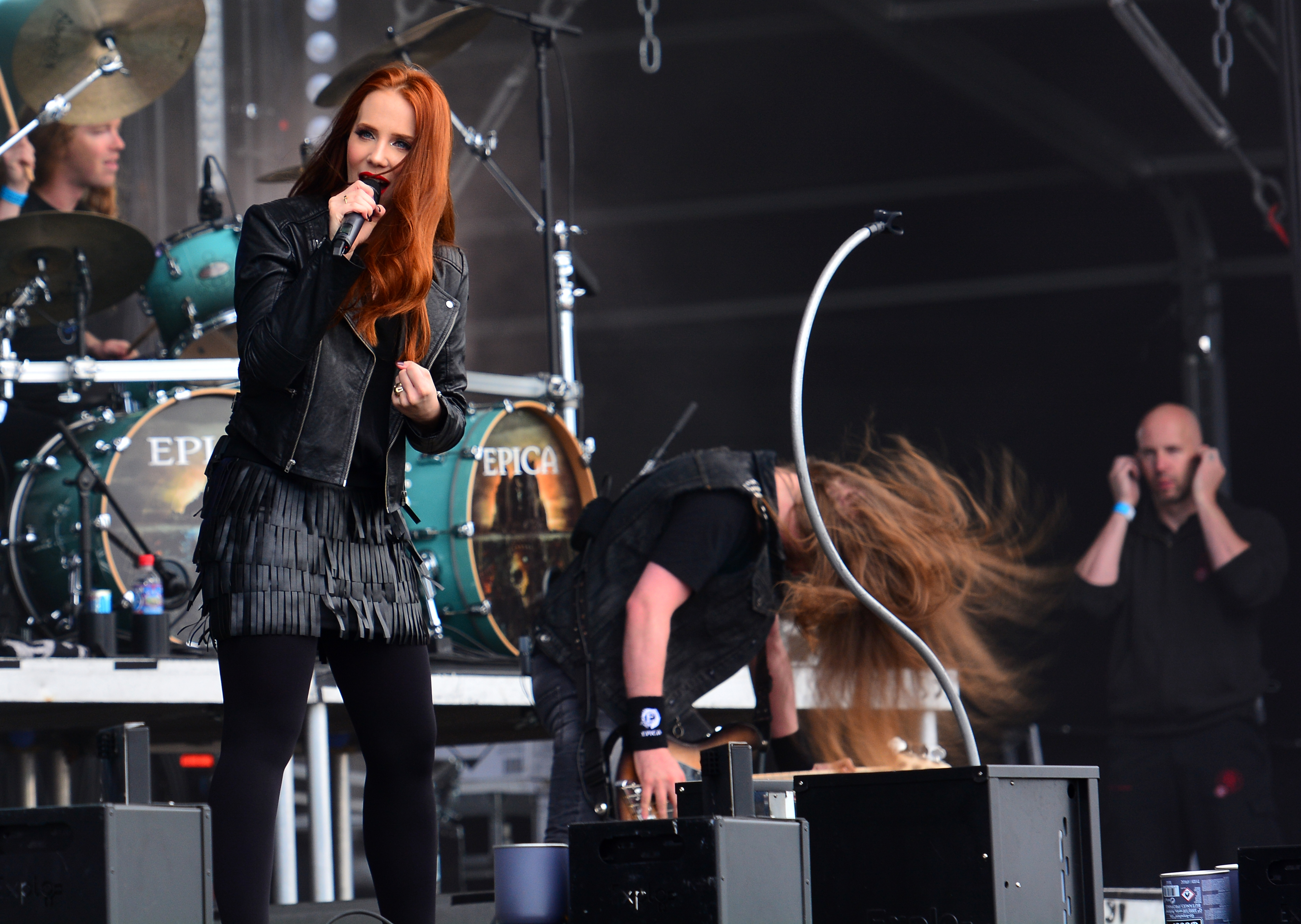 Epica beim Wacken Open Air 2015